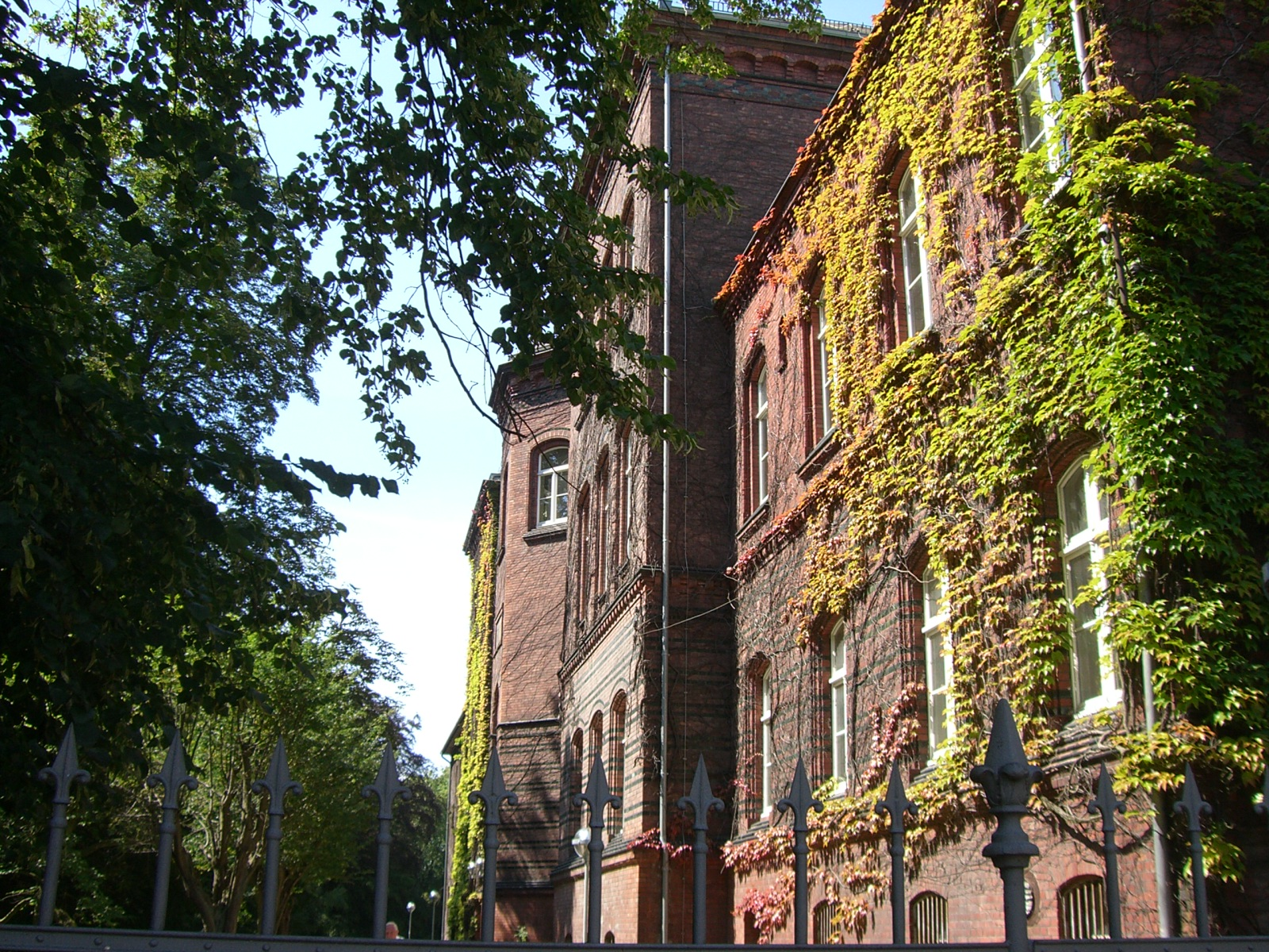 Greifswald